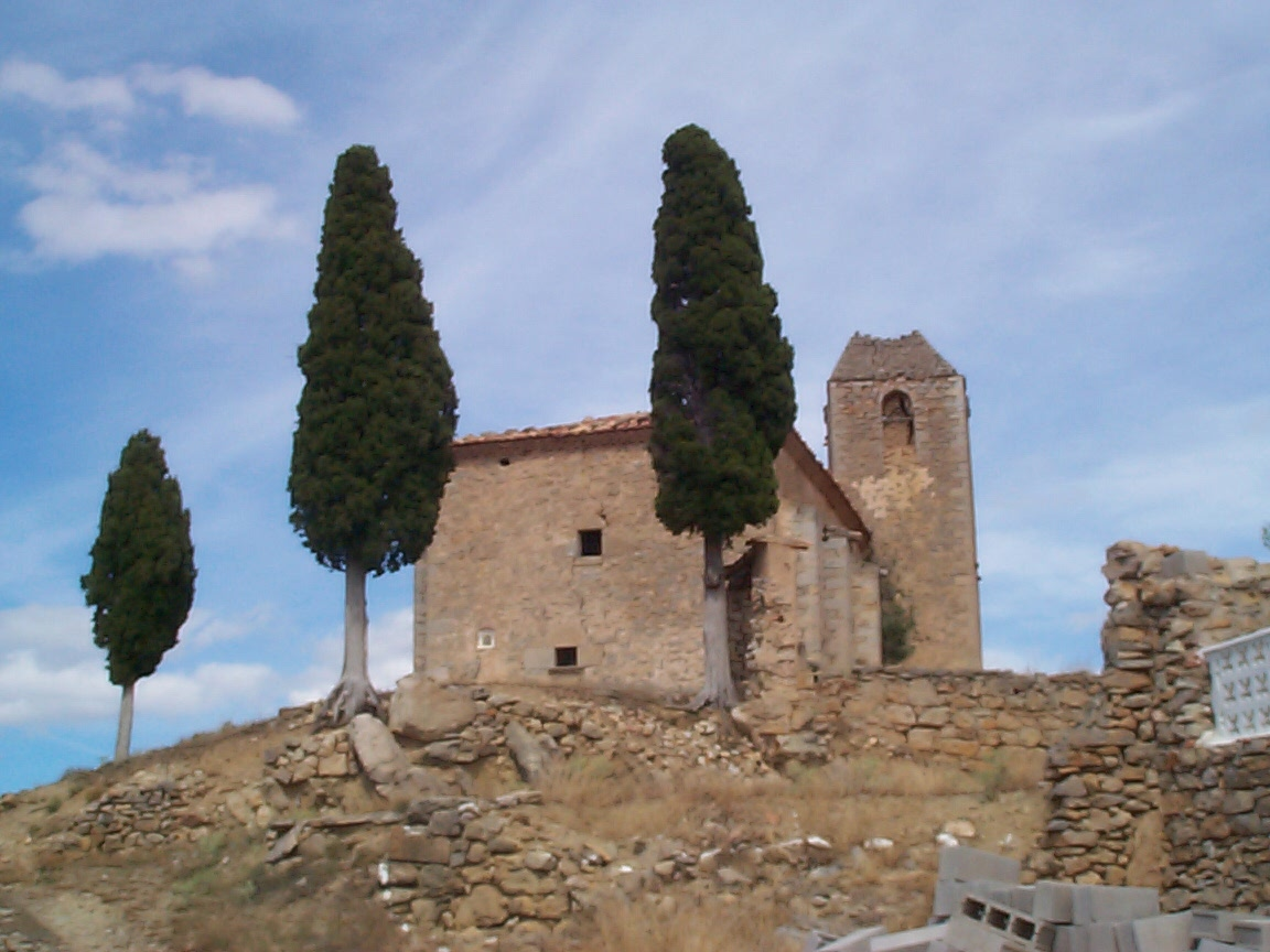 Calvario in Luco de Bordón